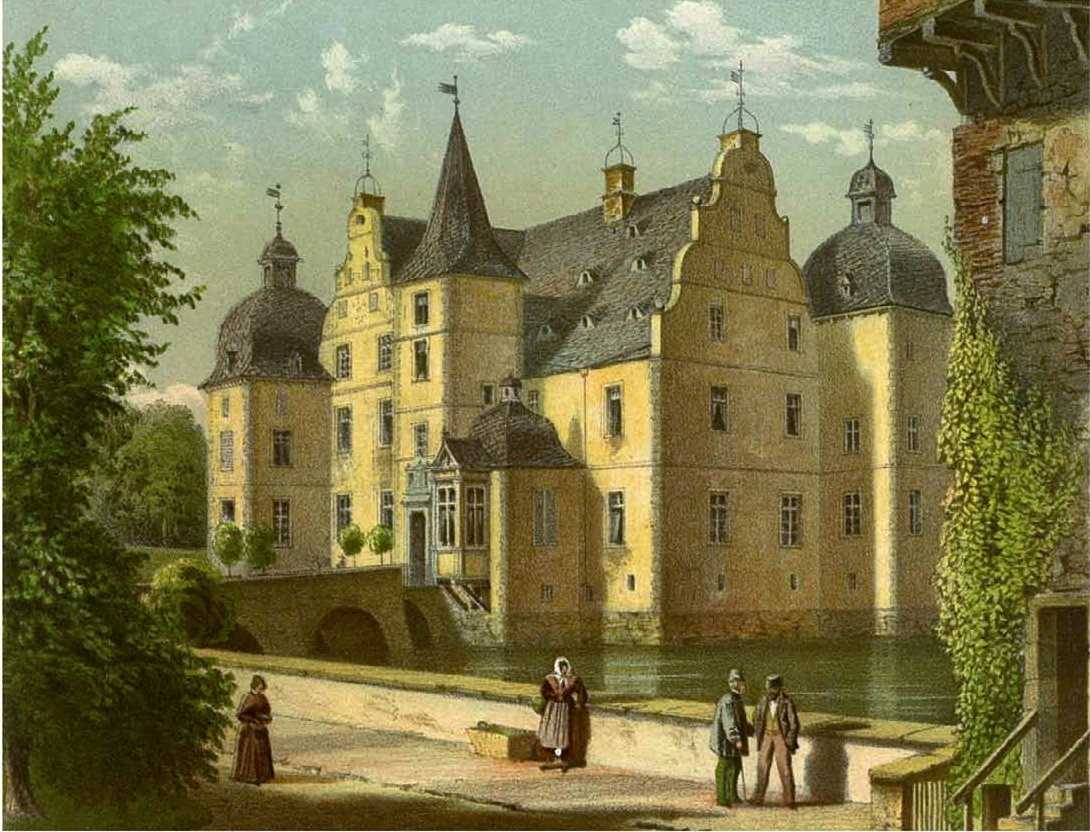 Wasserschloss Haus Bodelschwingh, Kreis Dortmund